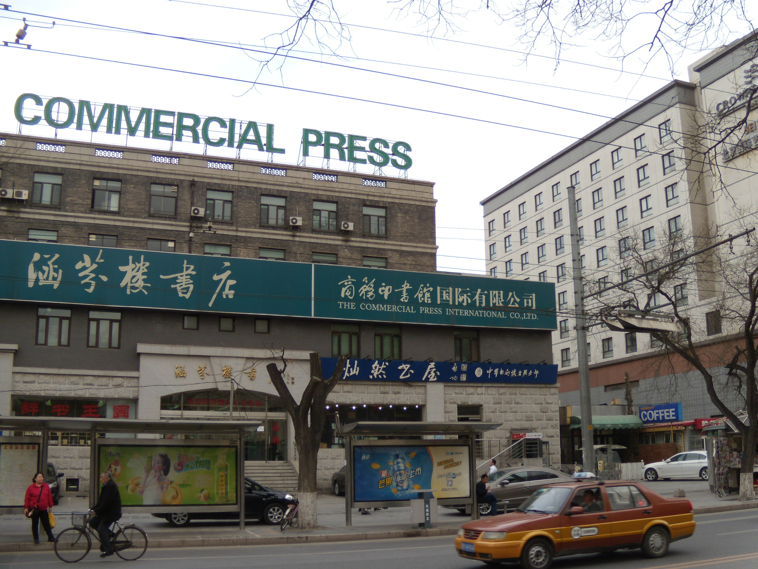 涵芬楼书店及灿然书屋，位于王府井大街